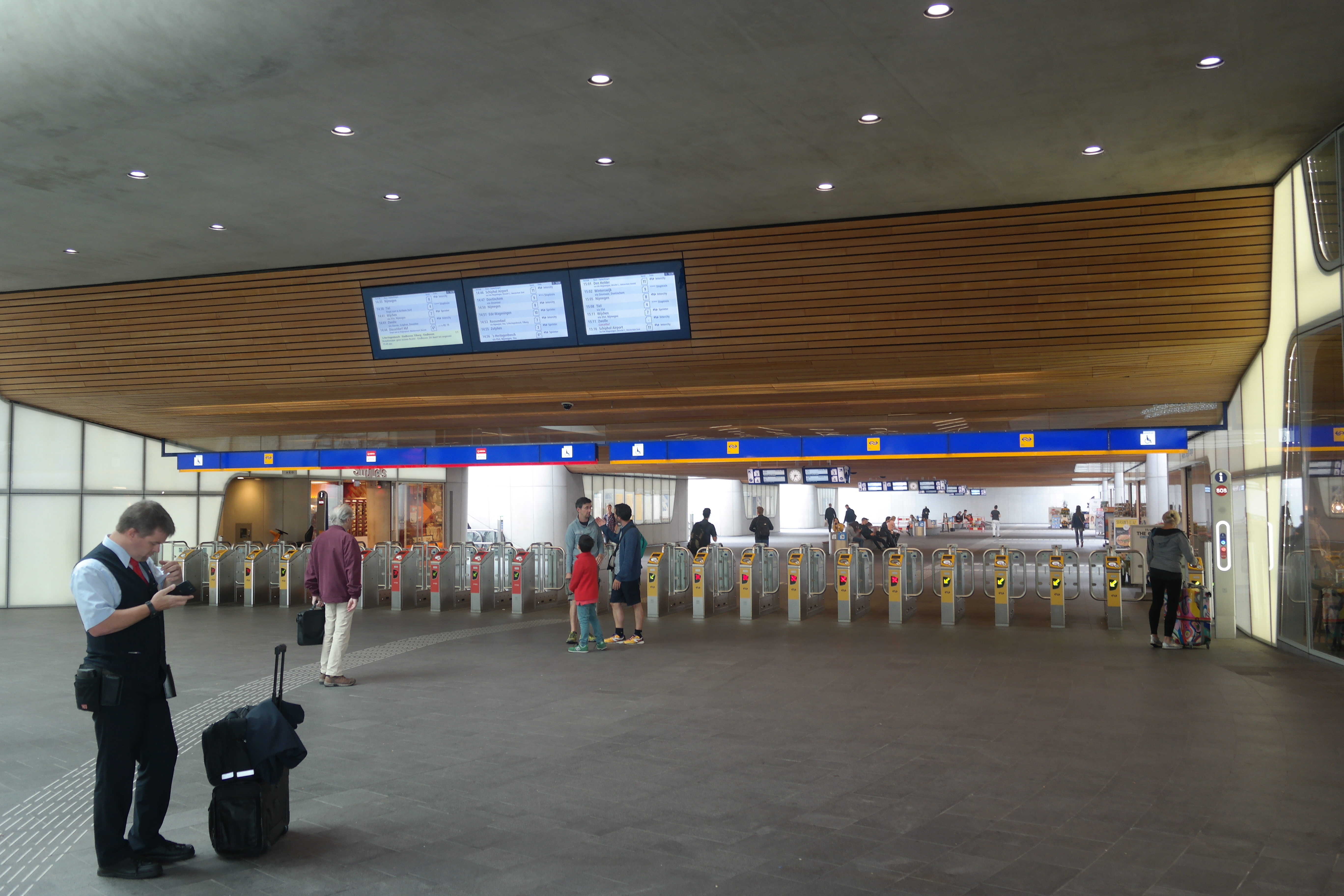 Station Arnhem Centraal anno 2017.